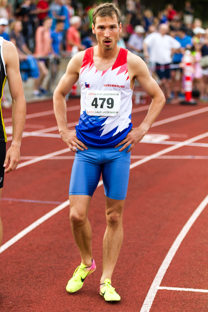 Laufgala des TSV Pfungstadt am 9. Juni 2018.